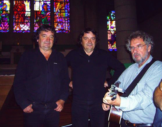 Pol et Hervé Quéfféléant avec Gilles Servat à Camaret sur Mer